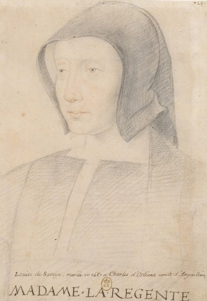 Louise de Savoie.